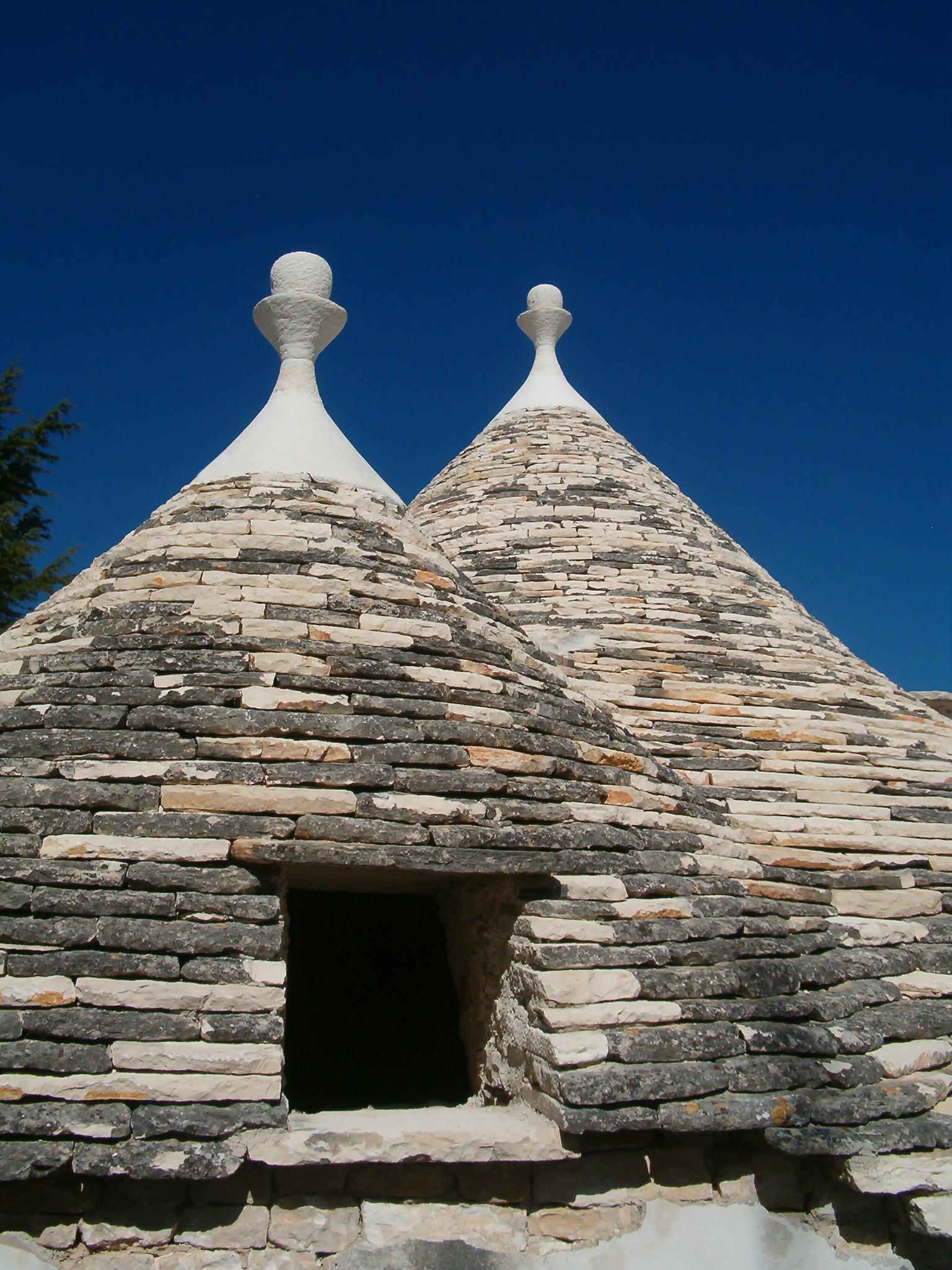 Trulli di Alberobello, Italy